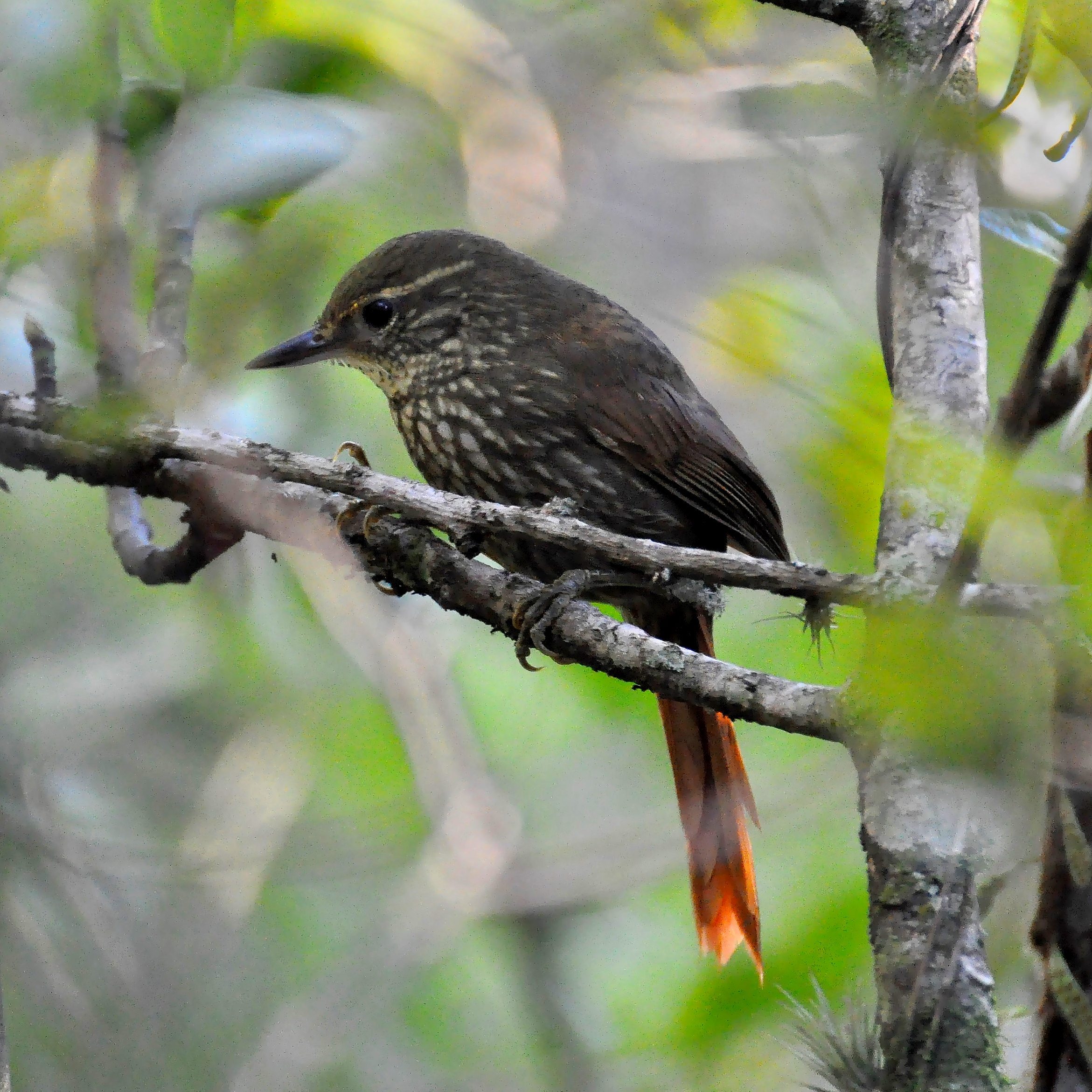 Syndactyla rufosuperciliata subsp. acrita photographed in Rio Grande do Sul, Brazil, in May 2010.